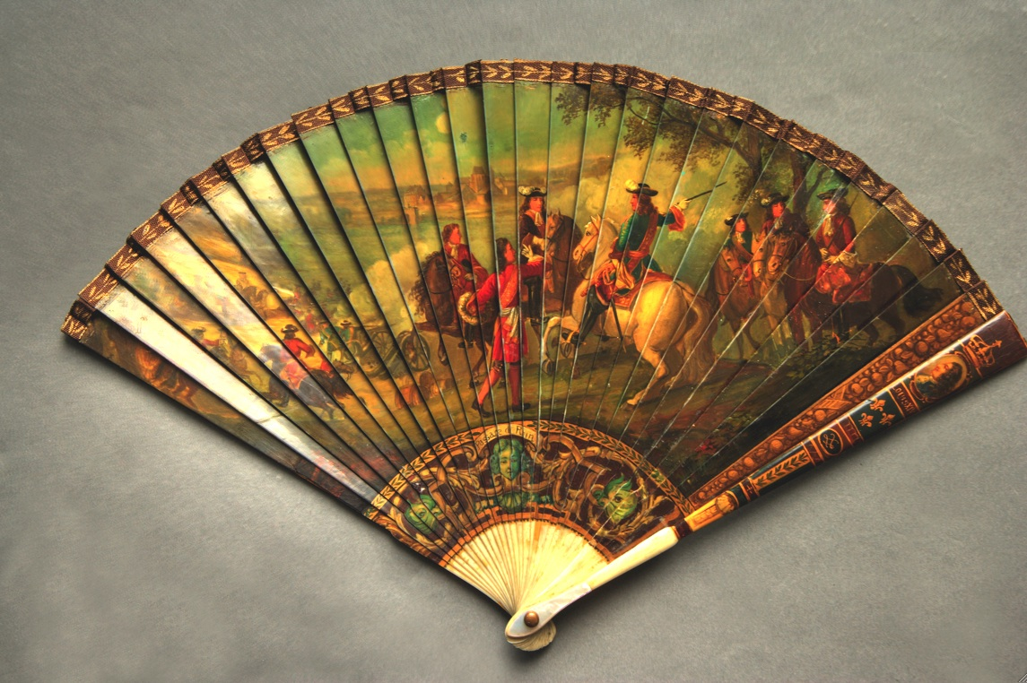 Eventail/Gozes-Passage du Rhin